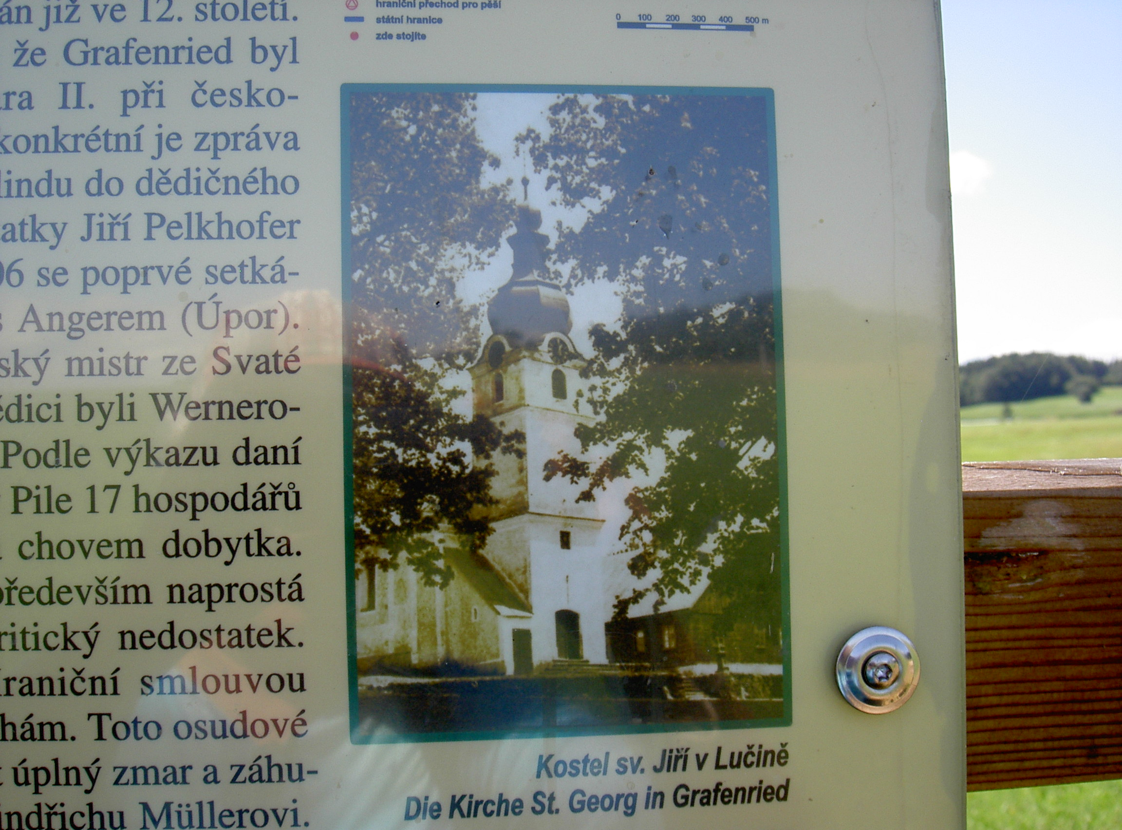 Grafenried (Lučina)